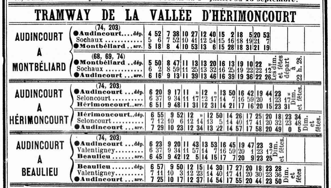 Tableau horaire du Tramway de la Vallée d'Hérimoncourt (TVH)